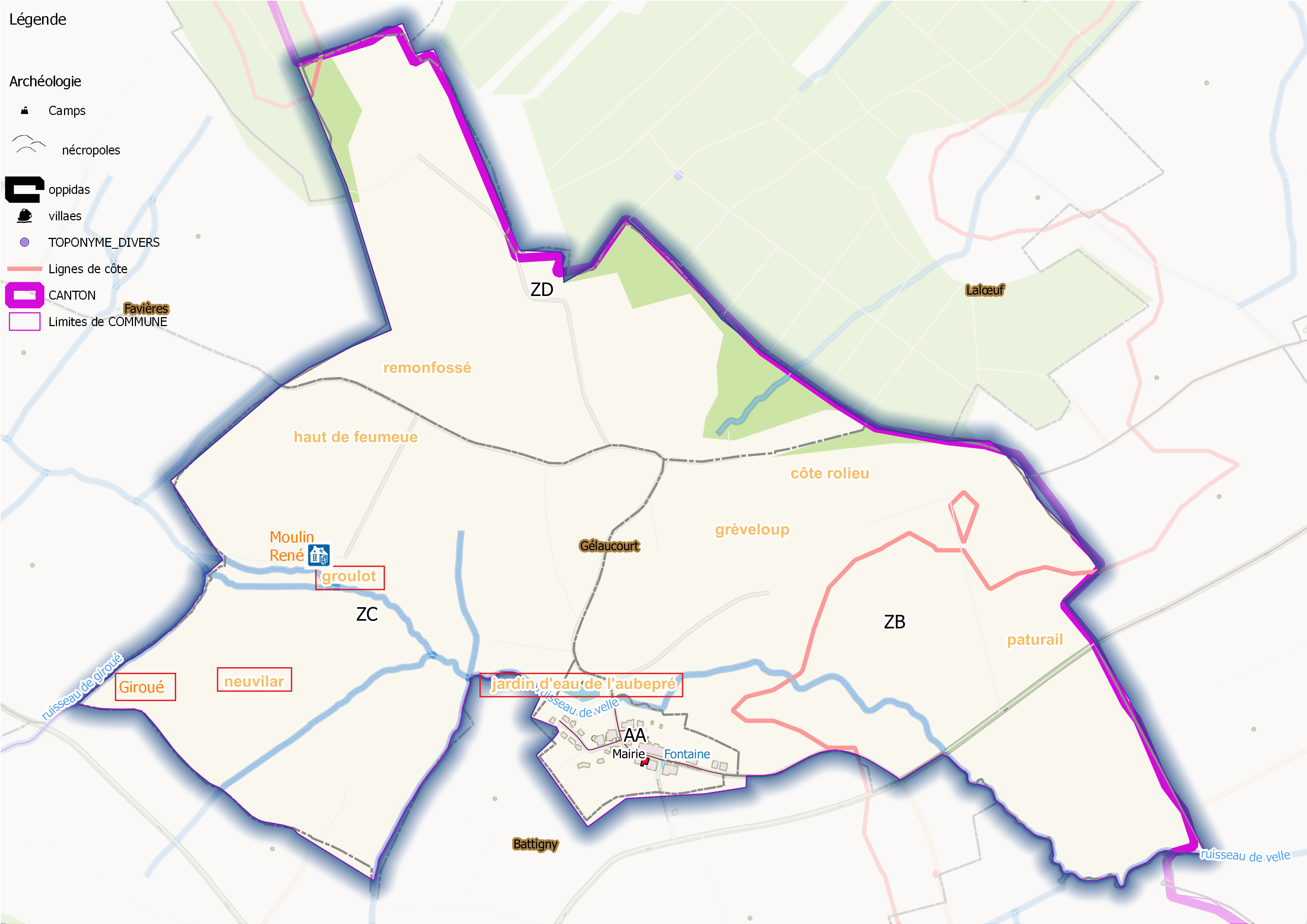 Gelaucourt (ban communal) OSM et Qgis, mentions additionnelles